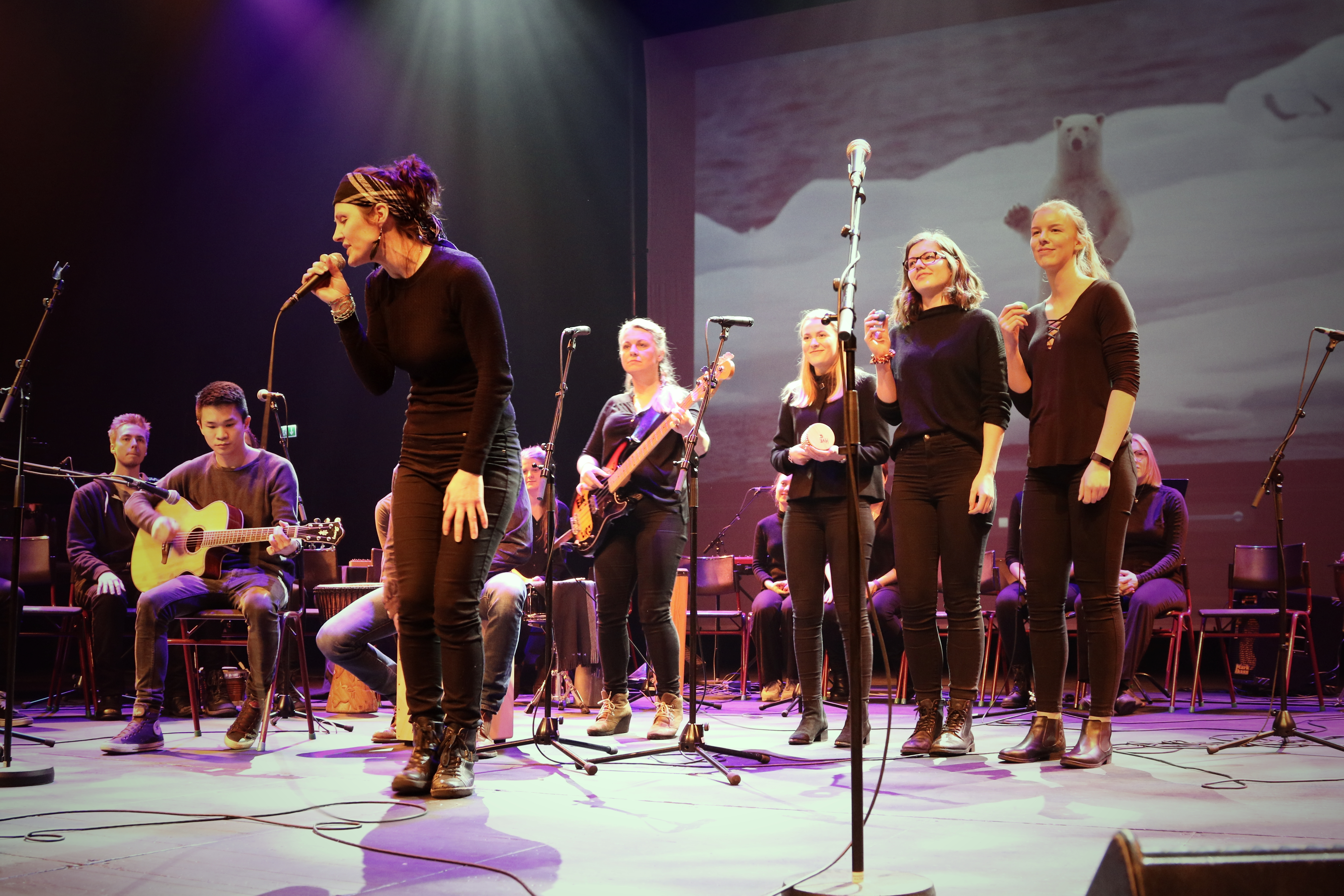 Musikkstudenter holder konserten «Musikk og bærekraft» i Bakkenteigen Konsertsal på campus Vestfold 02.02.18. Foto: Stian Kristoffer Sande.